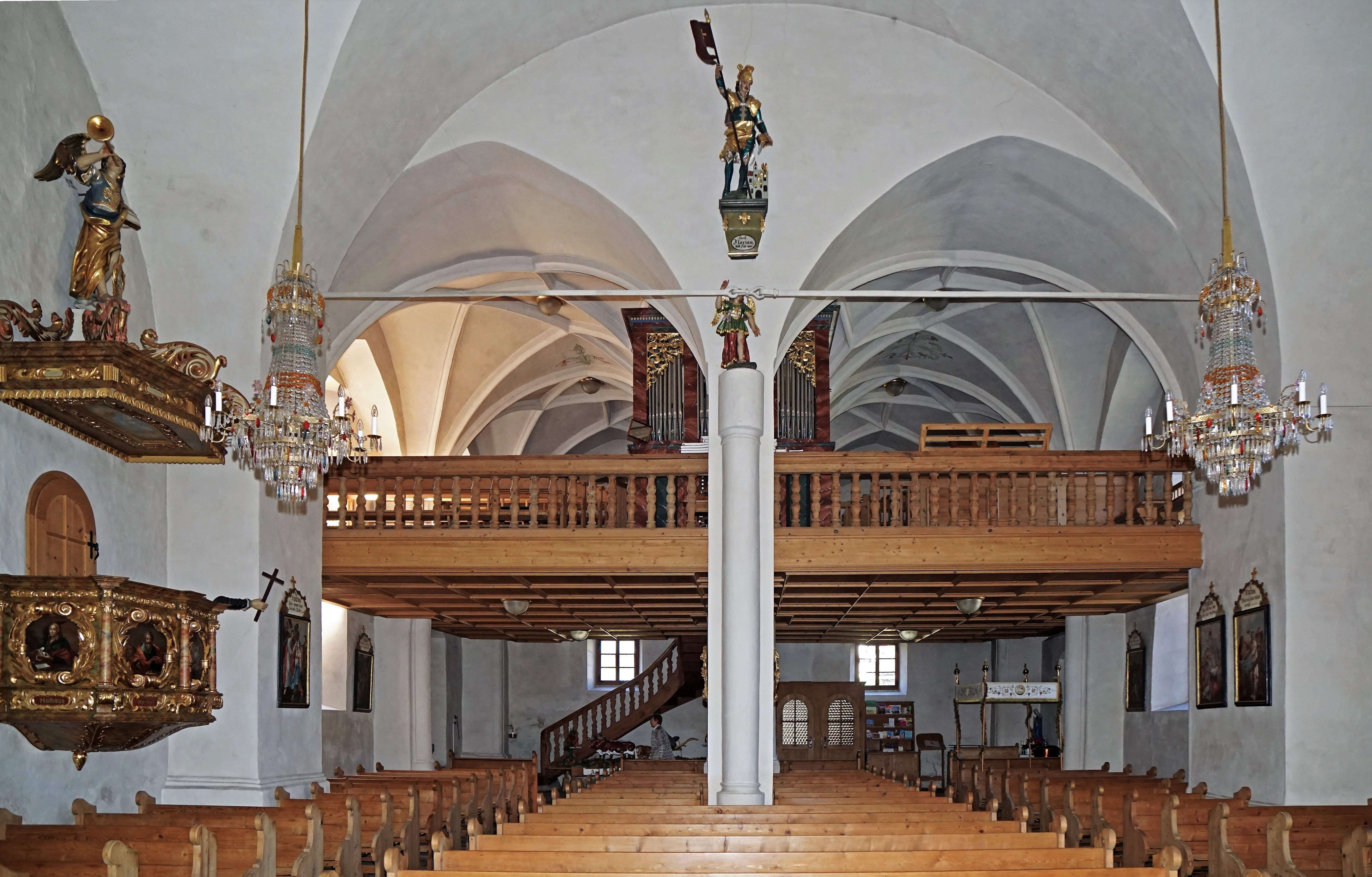 Kath. Pfarrkirche St. Peter im Katschtal (Rennweg am Katschberg), Innenansicht des Westteils des Langhauses mit Orgelempore